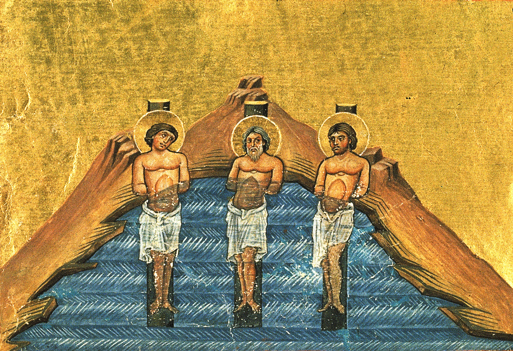 Мученики Инна, Пинна и Римма. Миниатюра из Минология Василия II. 976-1025 гг. (Vat. gr. 1613. P. 337)